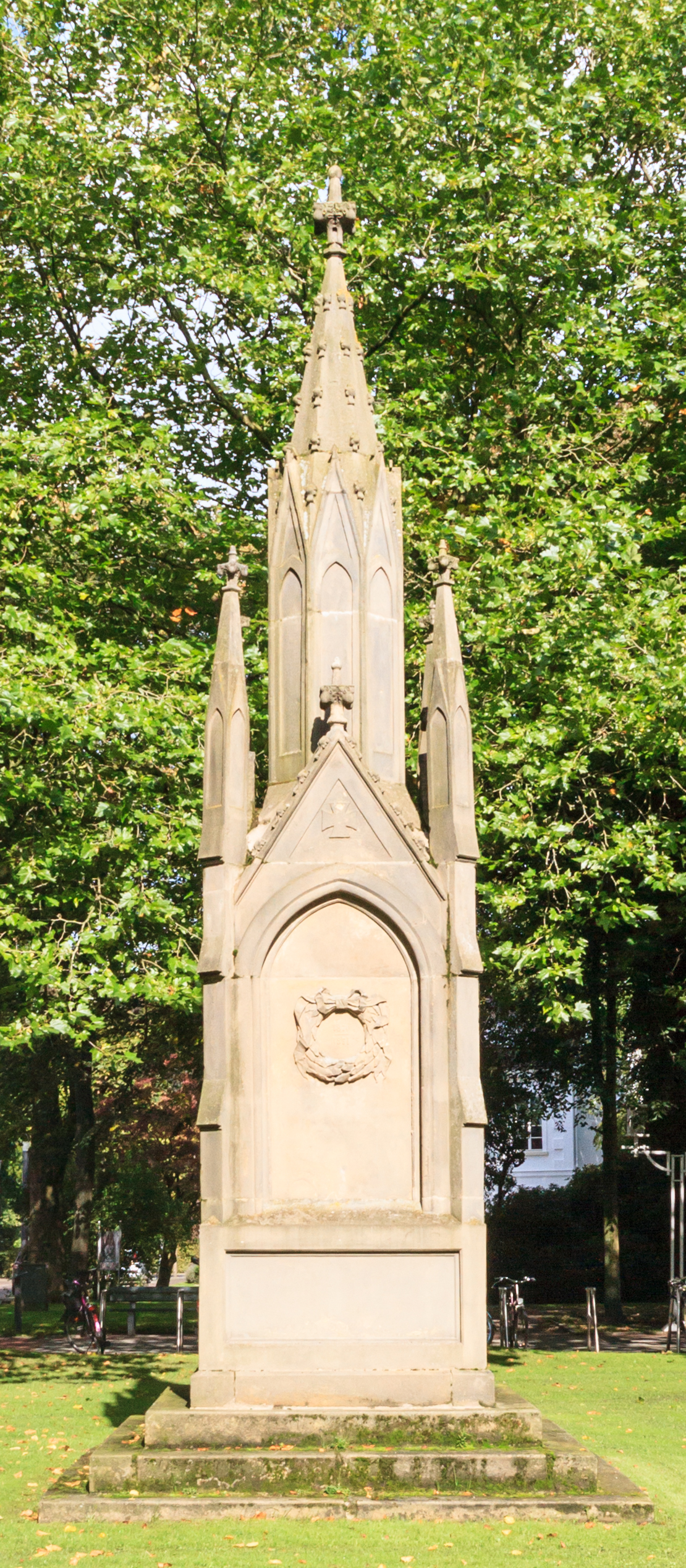 Kriegerdenkmal Aurich